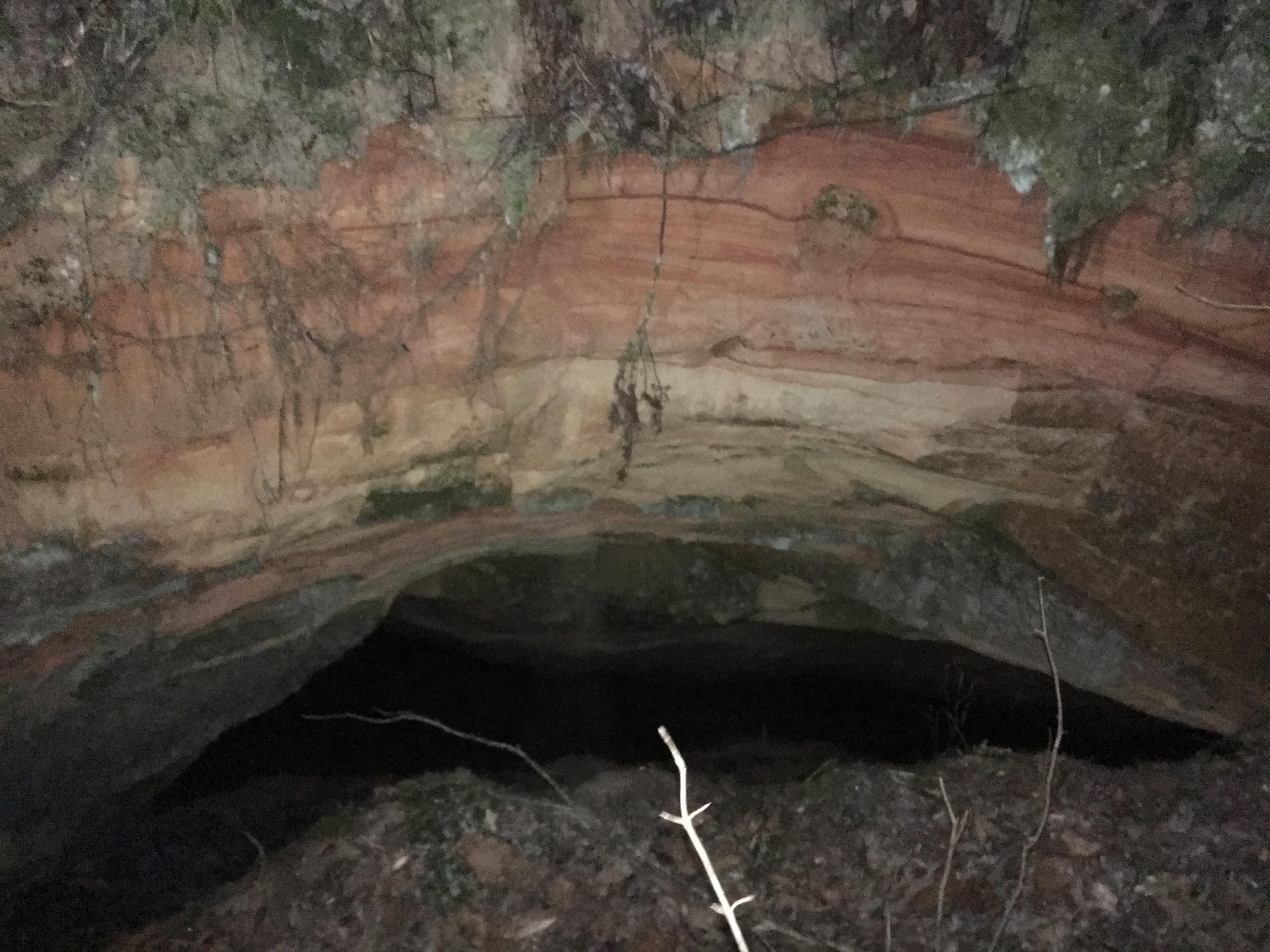 velnala